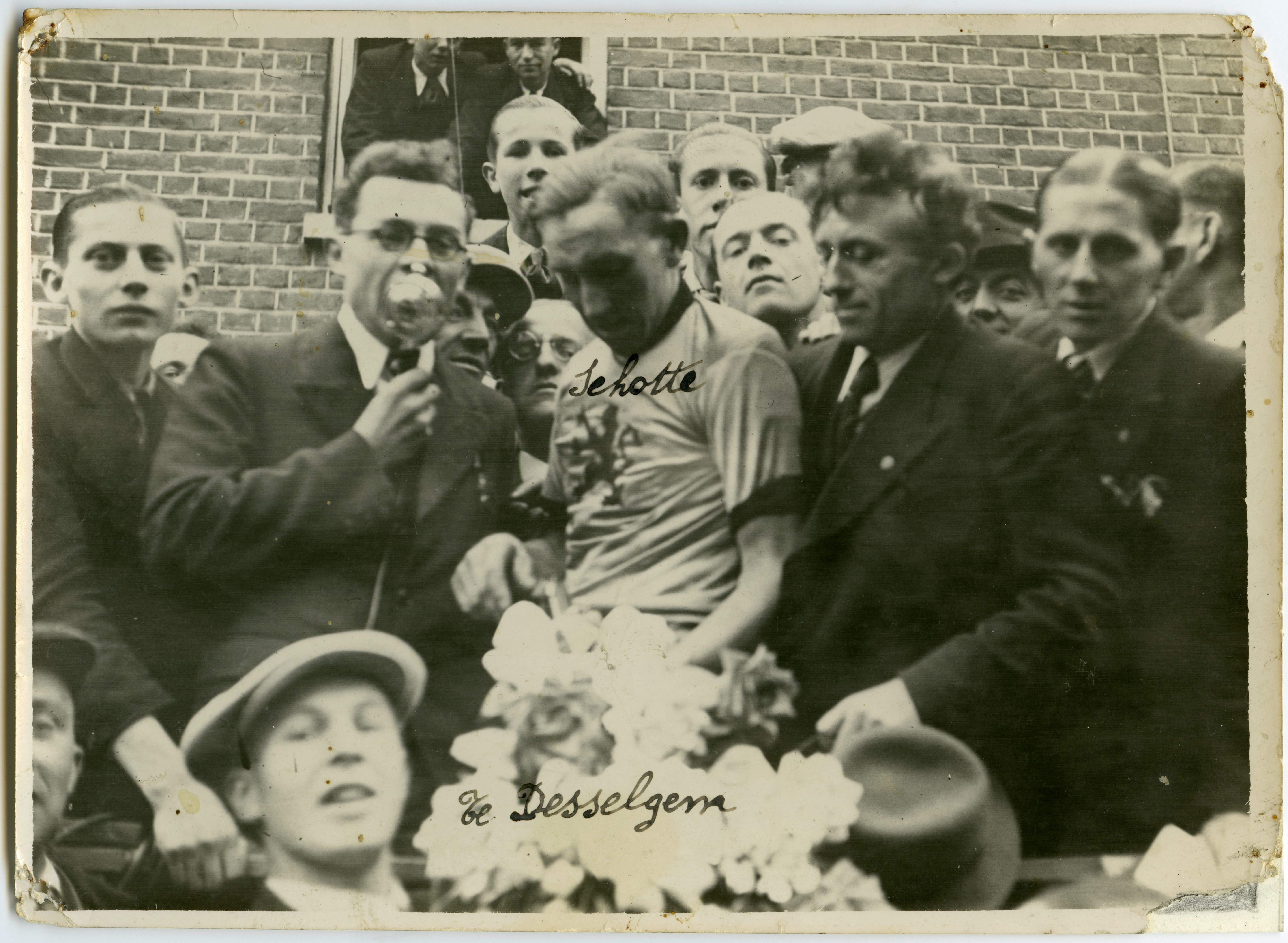 In 1941 wint Briek Schotte het Kampioenschap van Vlaanderen in Desselgem, op een boogscheut van zijn woonplaats. Eén jaar later beslist Veloclub Leiezonen Desselgem om jaarlijks een beroepsrennerswedstrijd te organiseren. De editie uit 1941 geldt als het startschot van Desselgem Koerse, dat intussen bekend staat als de Grote Prijs Briek Schotte.